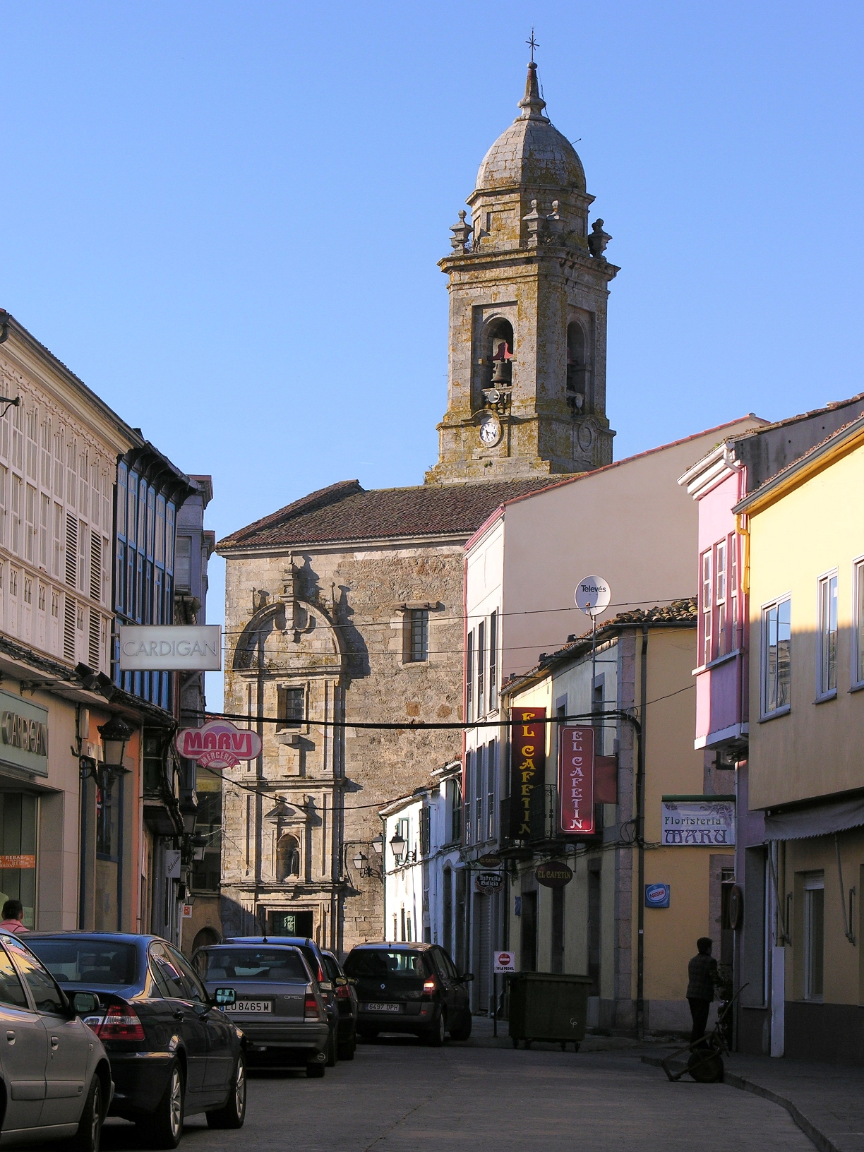 Igrexa en Melide, concello de Melide, Galiza.